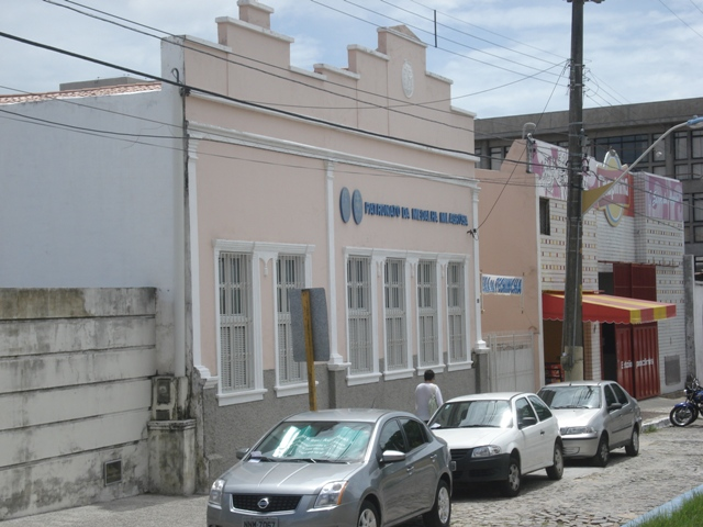 Patronato Medalha Milagrosa em Natal, Rio Grande do Norte, Brasil.